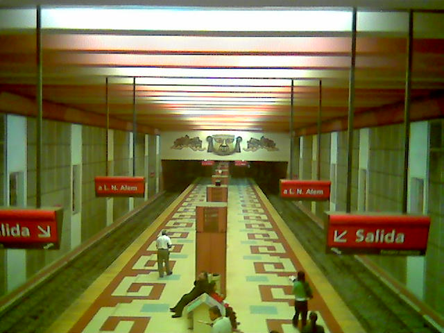 Estación Los Incas/Parque Chas de la línea B de la red de subterráneos de la Ciudad de Buenos Aires